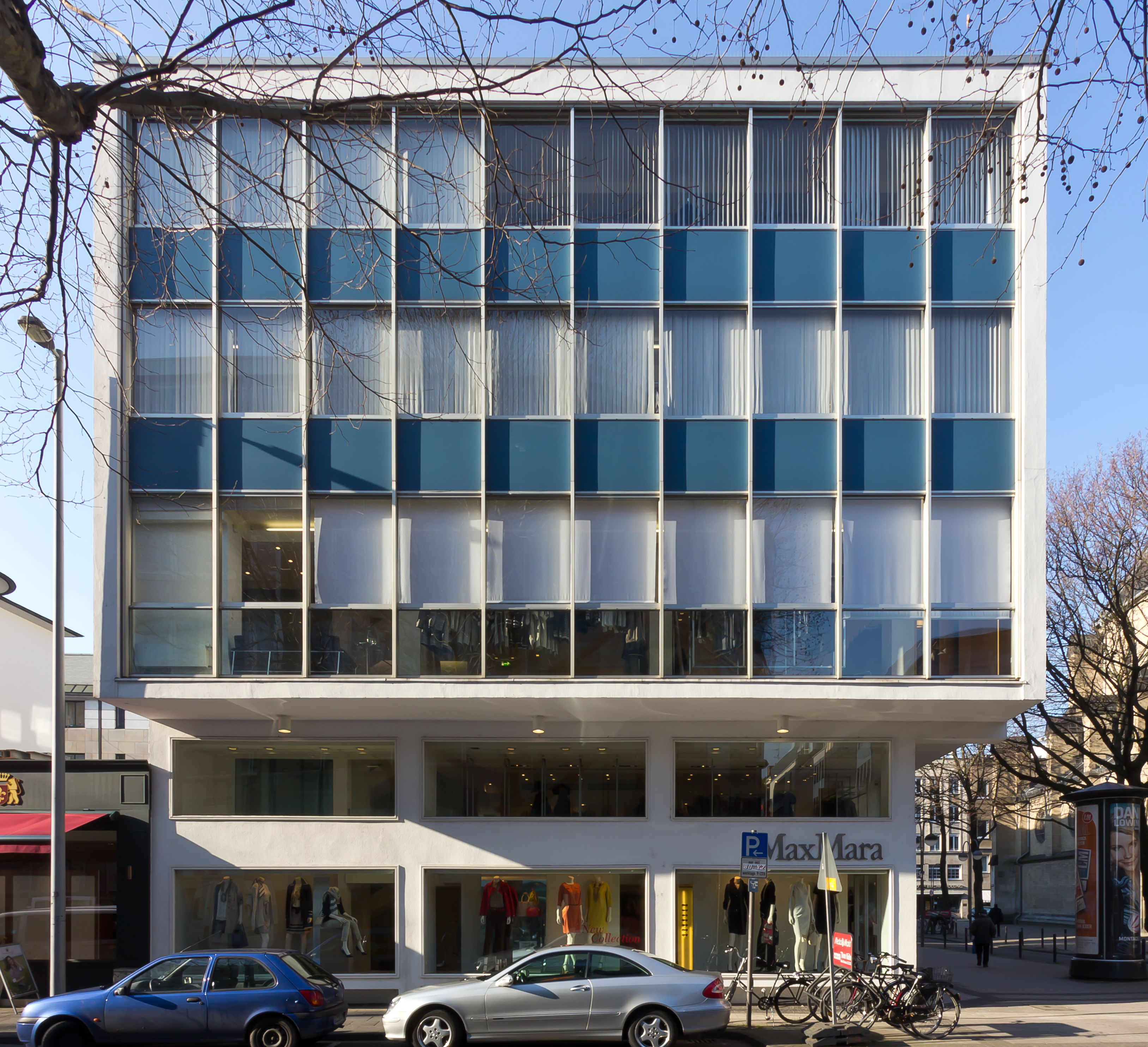 Denkmalgeschütztes Büro- und Geschäftshaus. Architekt: Fritz Ruempler, Baujahr: 1956/57